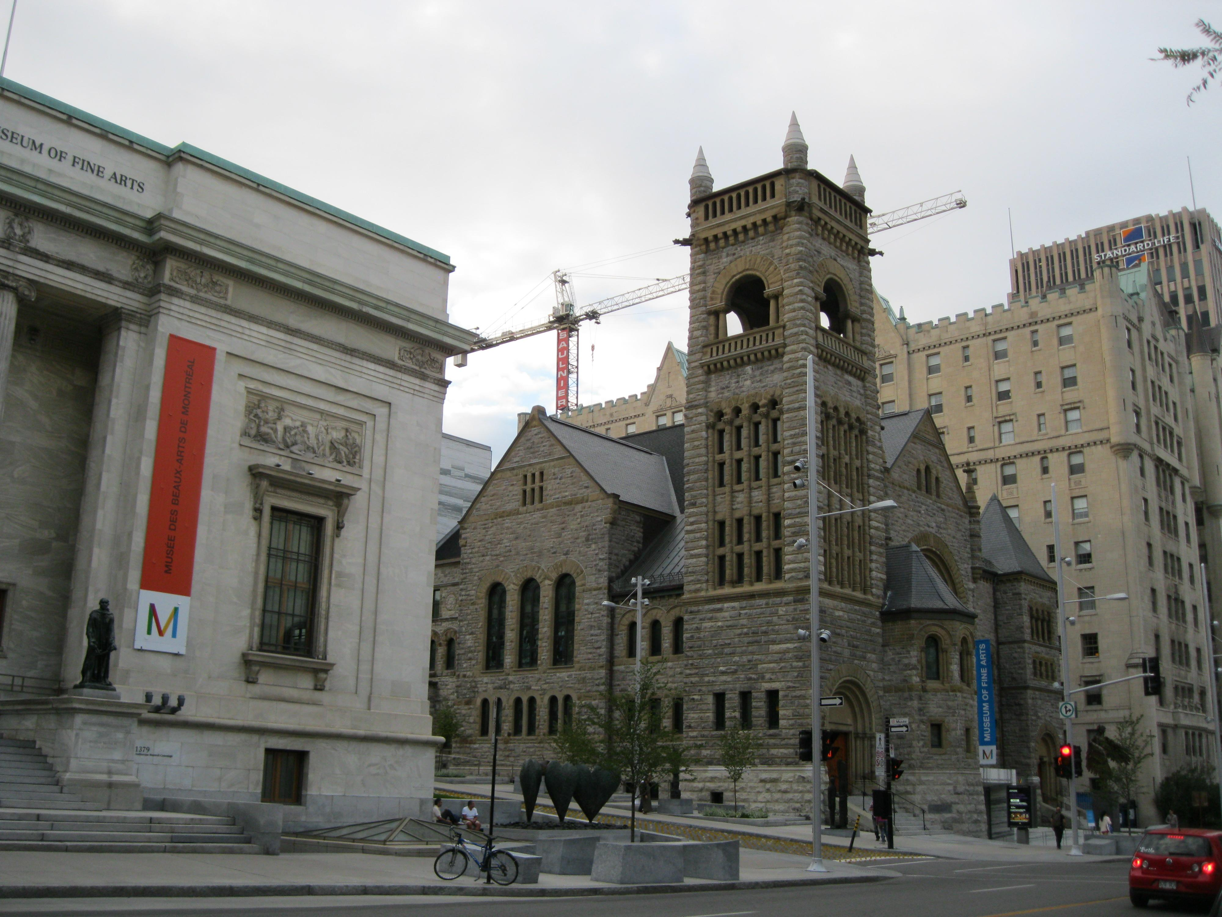 Musée des beaux-arts de Montréal